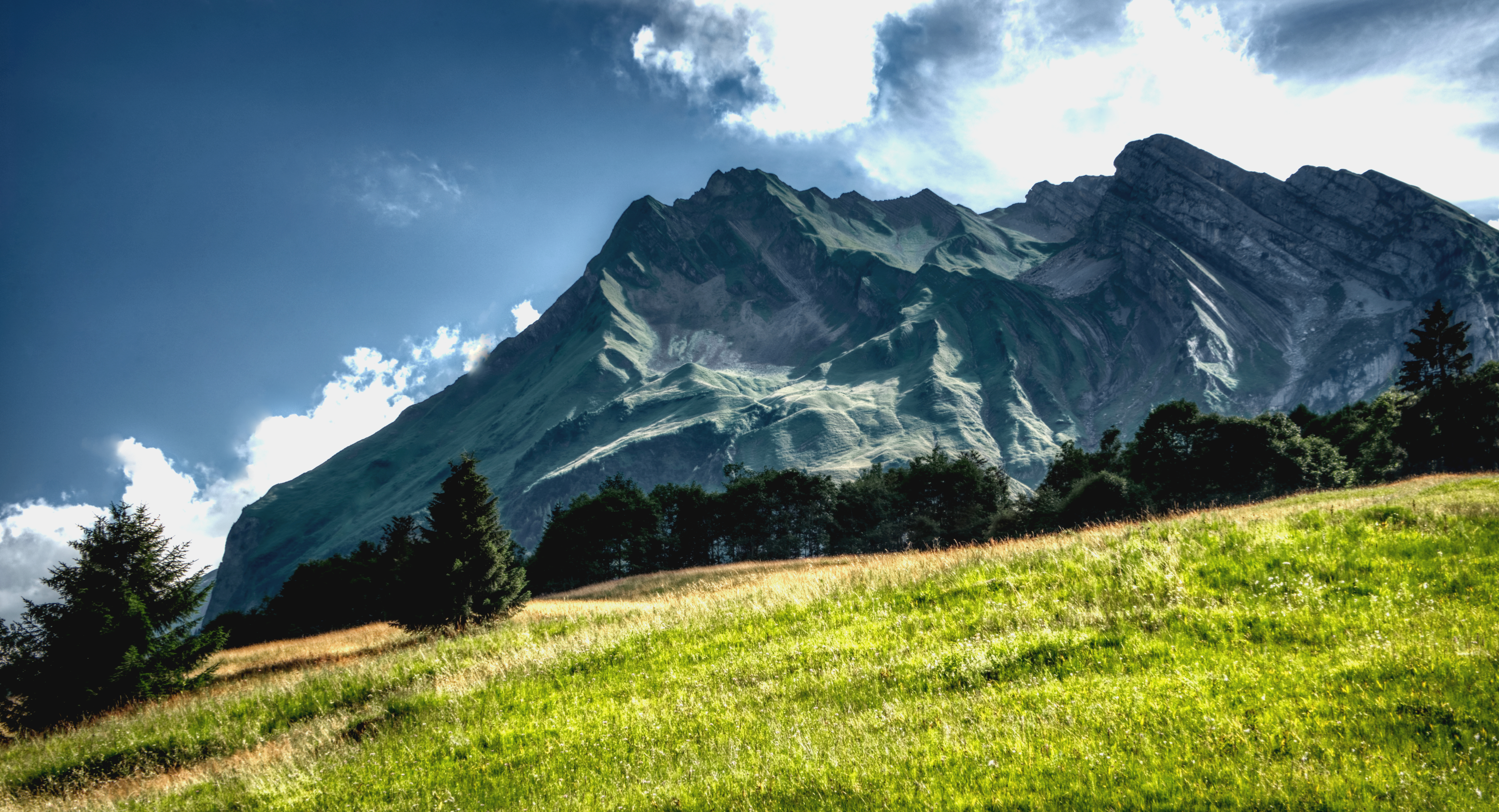 Fluebgrig vom Wäggitalerseer West-Ufer